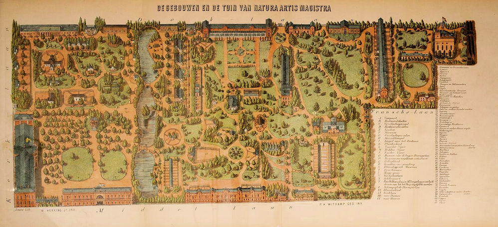 Plattegrond van Artis (1872) van P.H. Witkamp, gepubliceerd in De Dierentuin van het Koninklijk Zoölogisch Genootschap Natura Artis Magistra te Amsterdam. Uitgegeven bij Gebroeders van Es in Amsterdam.